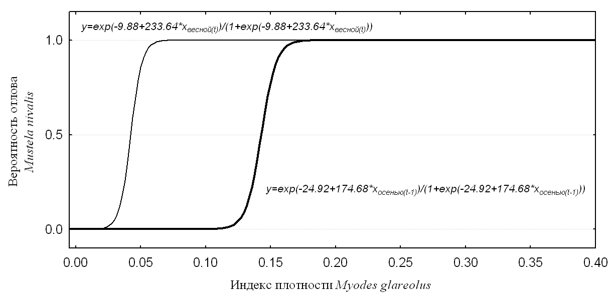 Зависимость вероятности поимок Mustela nivalis в t-году от плотности основной жертвы – Myodes glareolus осенью предыдущего года (жирная линия) или весной текущего года (тонкая линия). Логит-регрессия по обучающей части ряда наблюдений – 1994(5)-2004 гг.. Средний Урал, темнохвойная южная тайга, Висимский заповедник. (Kshnyesev&Davydova, 2010)